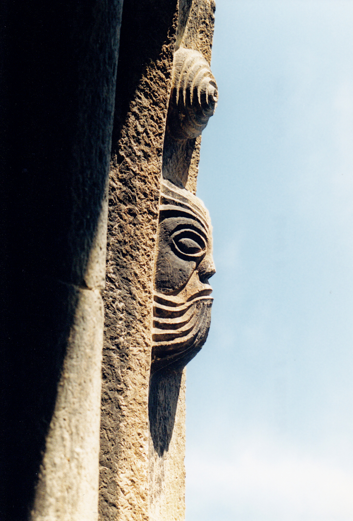 Espagne - Basse-Cerdagne - Ger - Saga - Église Sainte-Eugénie